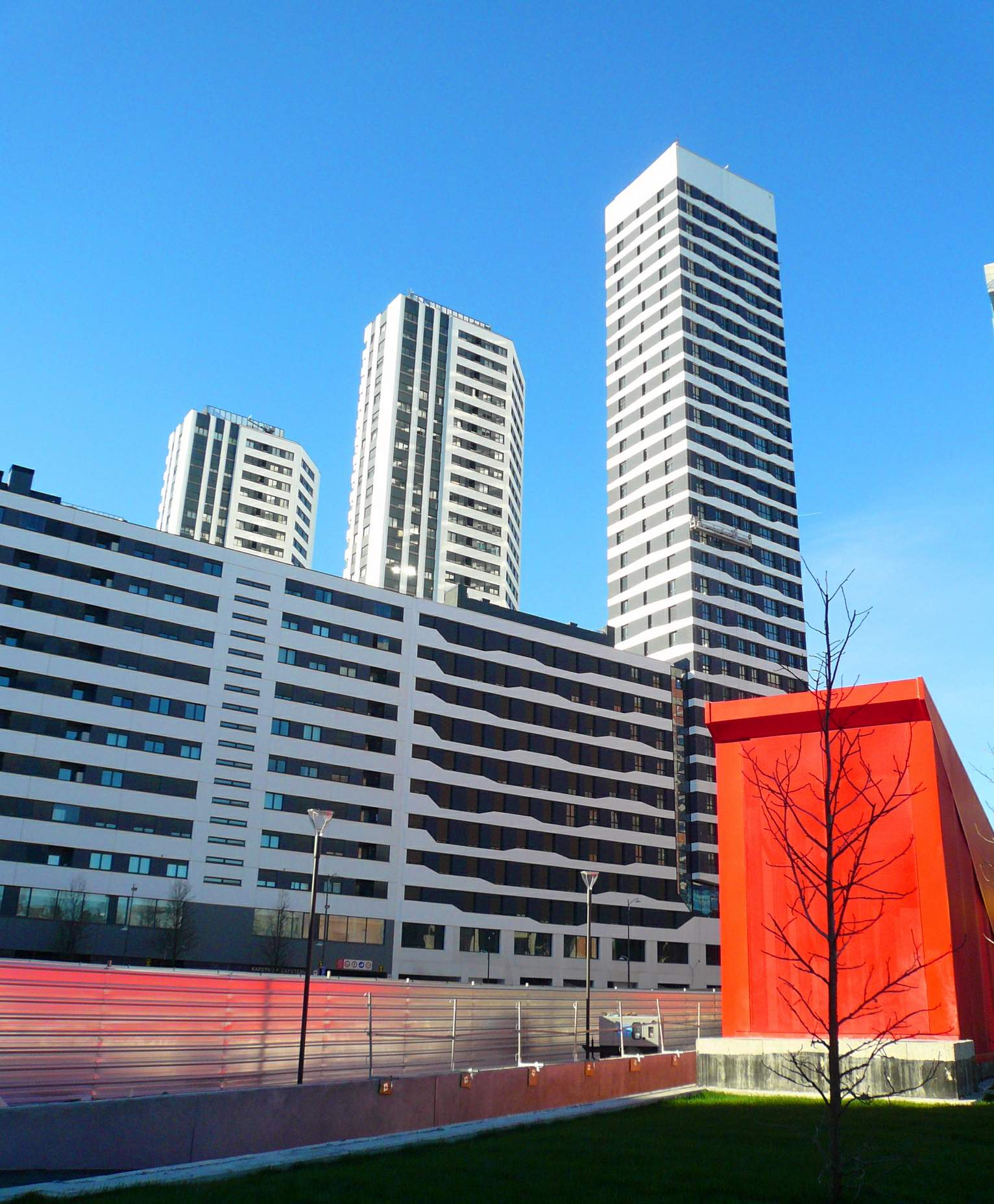 Bilbao - Dorre Barriak